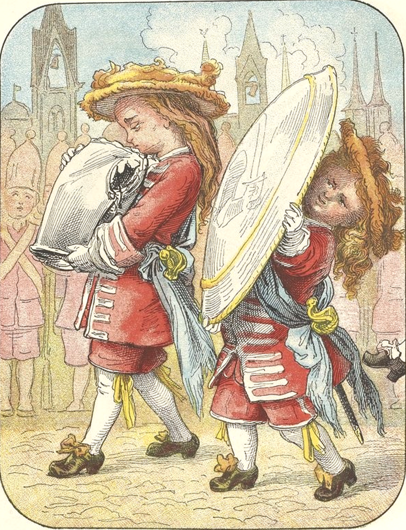 Malbrough s'en va-t-en guerre, 1878, dessins par Frølich (1820-1908), textes par Stahl, Hetzel éditeur ː page 6.